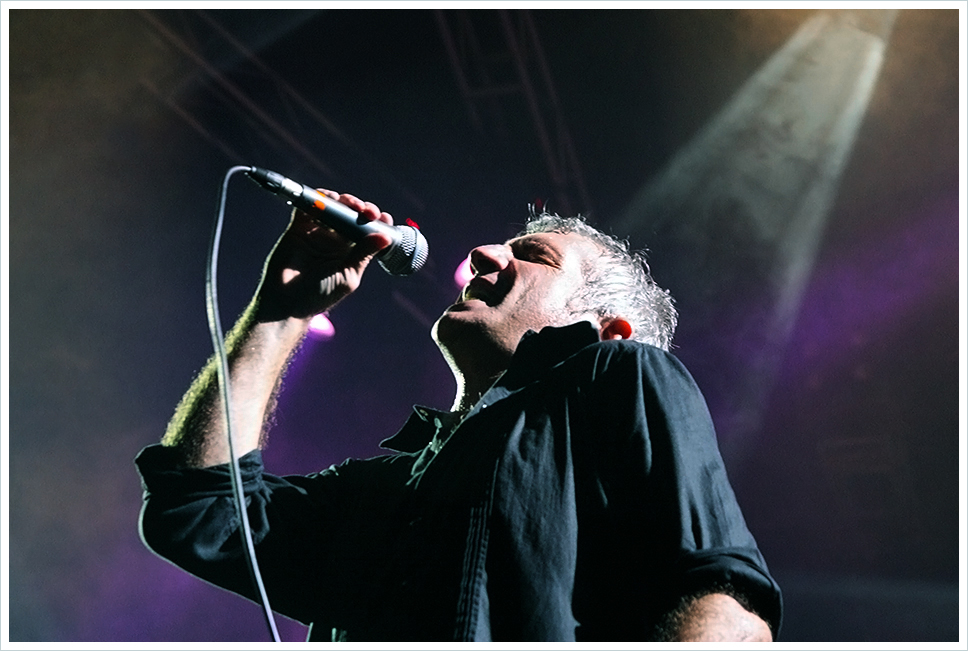 Fotografía de Gabriel Peluffo, voz principal del grupo de rock de Uruguay "Buitres despues de la una", en una actuación en la Rural del Prado de Montevideo.